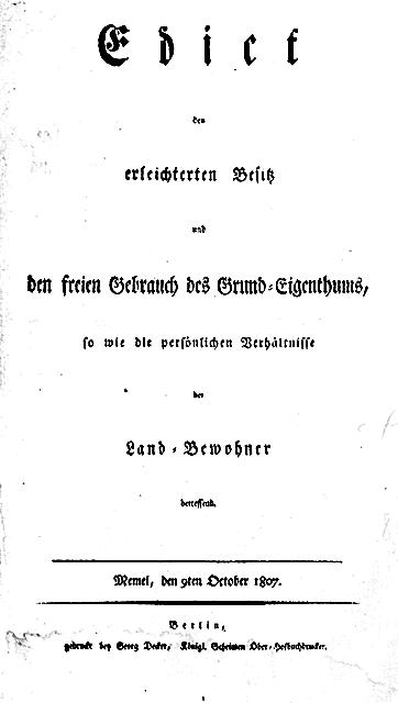 Preußisches Oktoberedikt von 1807